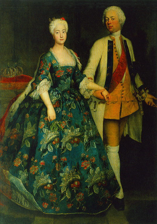 Prinzessin Sophie Dorothea Marie (1719-1765) mit ihrem Gemahl Friedrich Wilhelm, Markgraf von Brandenburg-Schwedt (1700-1771). 1734, A. Pesne